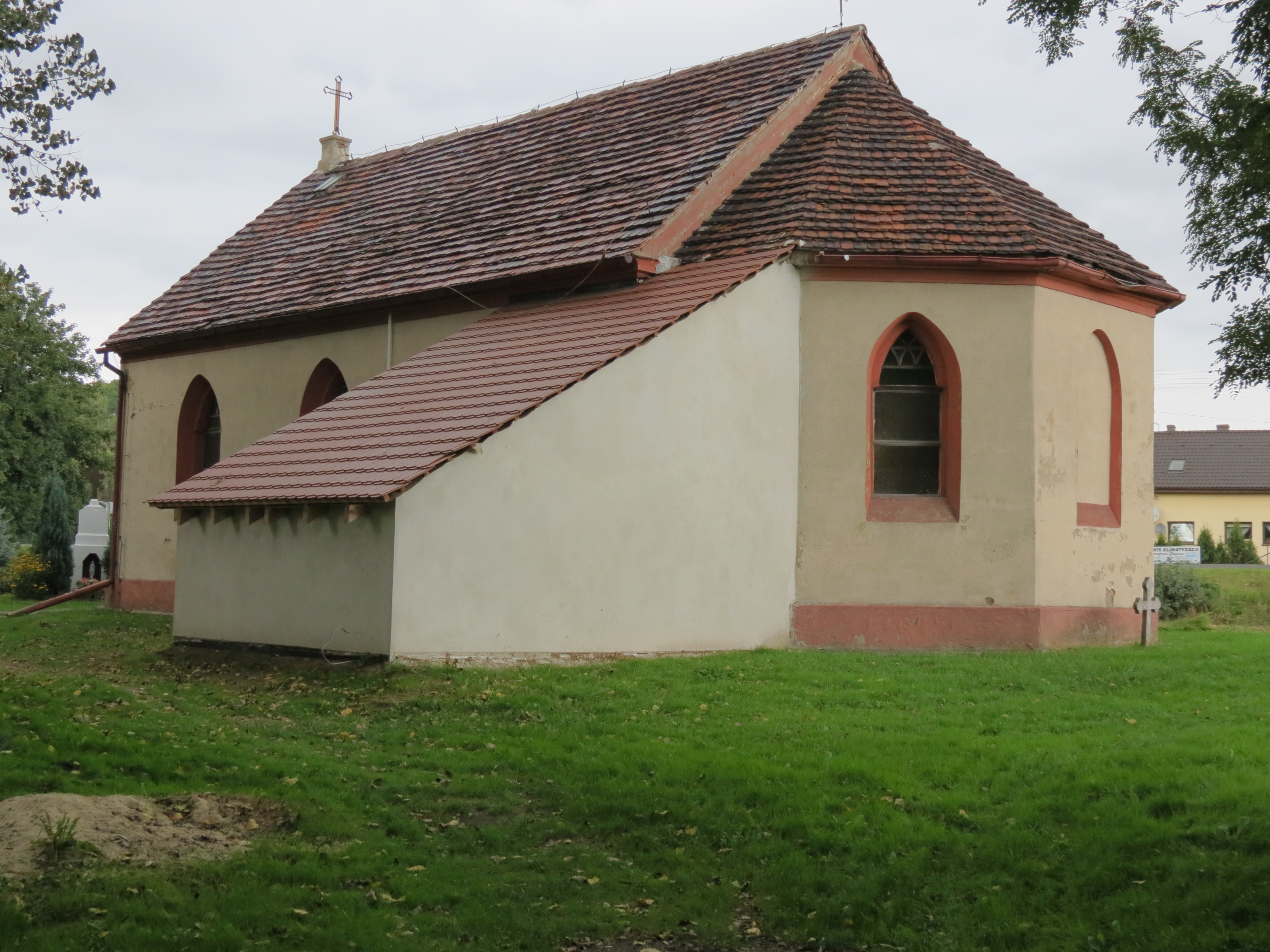 Zawada - kościół filialny p.w. świętego Marka (zabytek nr A/280/60)